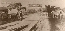 Estrada Vila Conceição em Diadema, séculos XVII e XVIII